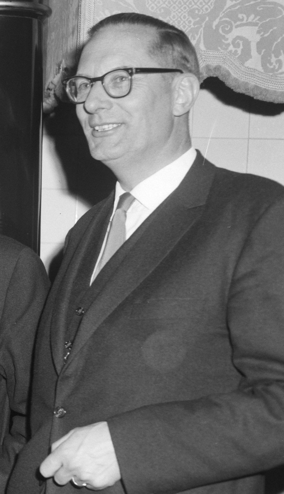 Collectie / Archief : Fotocollectie Anefo Reportage / Serie : [ onbekend ] Beschrijving : Bestuurswisseling van Federatie van Nederlandse Journalisten van de Raad van Tucht . Cals, van Dullema van Hamel , Kropman en Enschede Datum : 11 december 1963 Locatie : Enschede Persoonsnaam : geenCALS Fotograaf : Bilsen, Joop van / Anefo Auteursrechthebbende : Nationaal Archief Materiaalsoort : Negatief (zwart/wit) Nummer archiefinventaris : bekijk toegang 2.24.01.04 Bestanddeelnummer : 915-8331